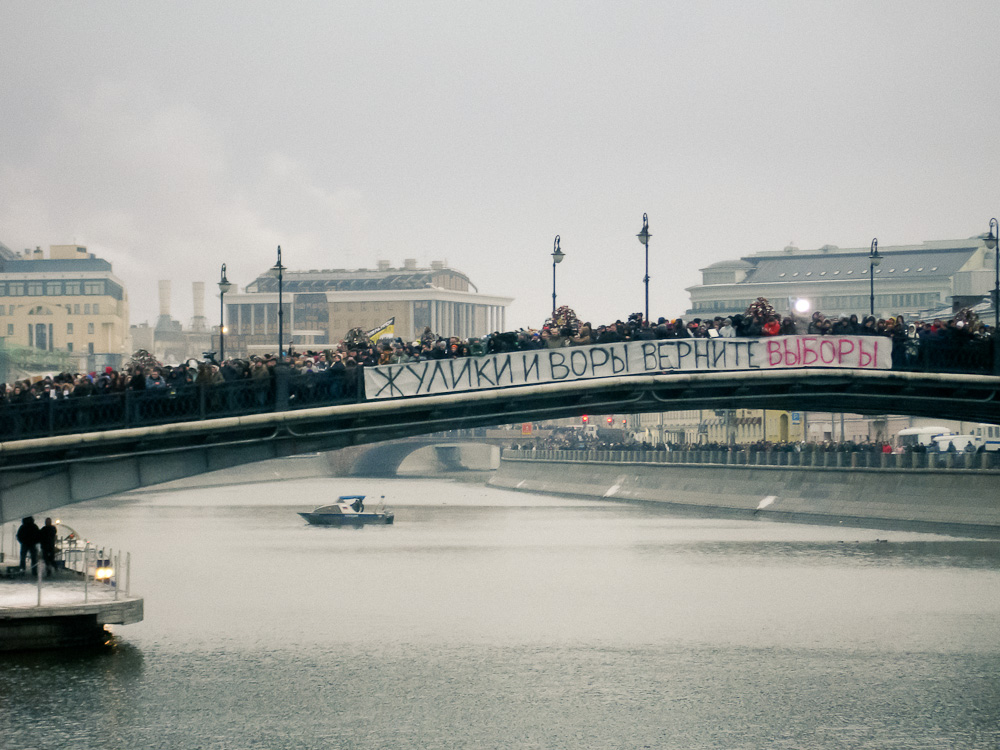 Митинг на Болотной площади